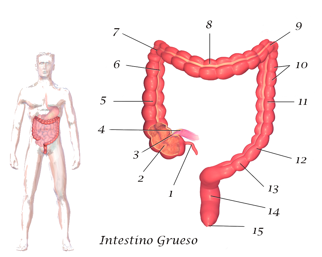 Esquema del intestino grueso en el que aparecen numeradas las diferentes porciones que lo componen.